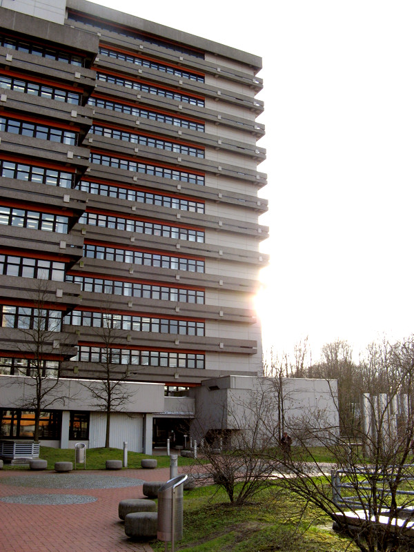 Universität Duisburg-Essen, Campus Essen - Klinikum, Virchowstraße, Institutsgruppengebäude